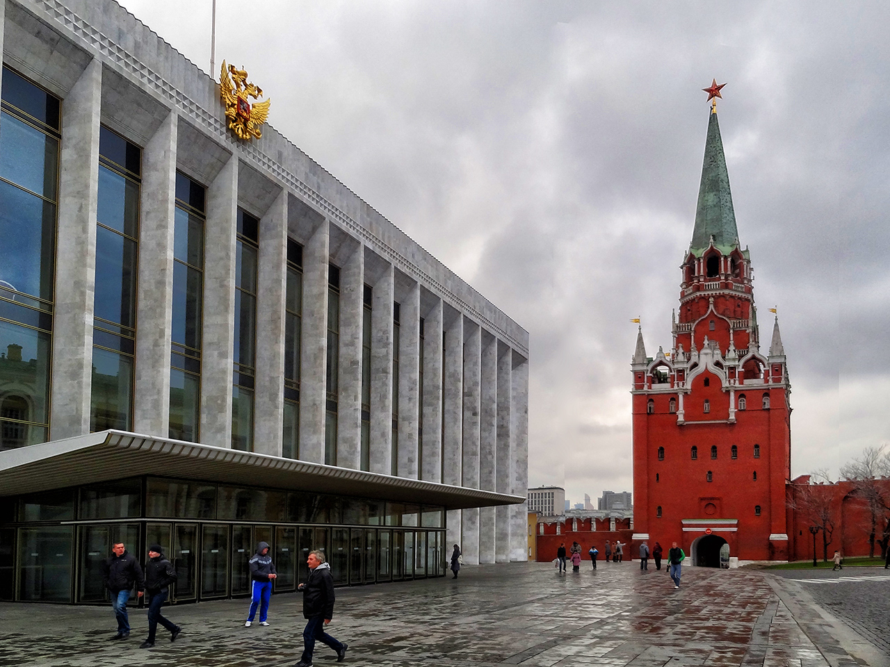 Кремлевский дворец съездов